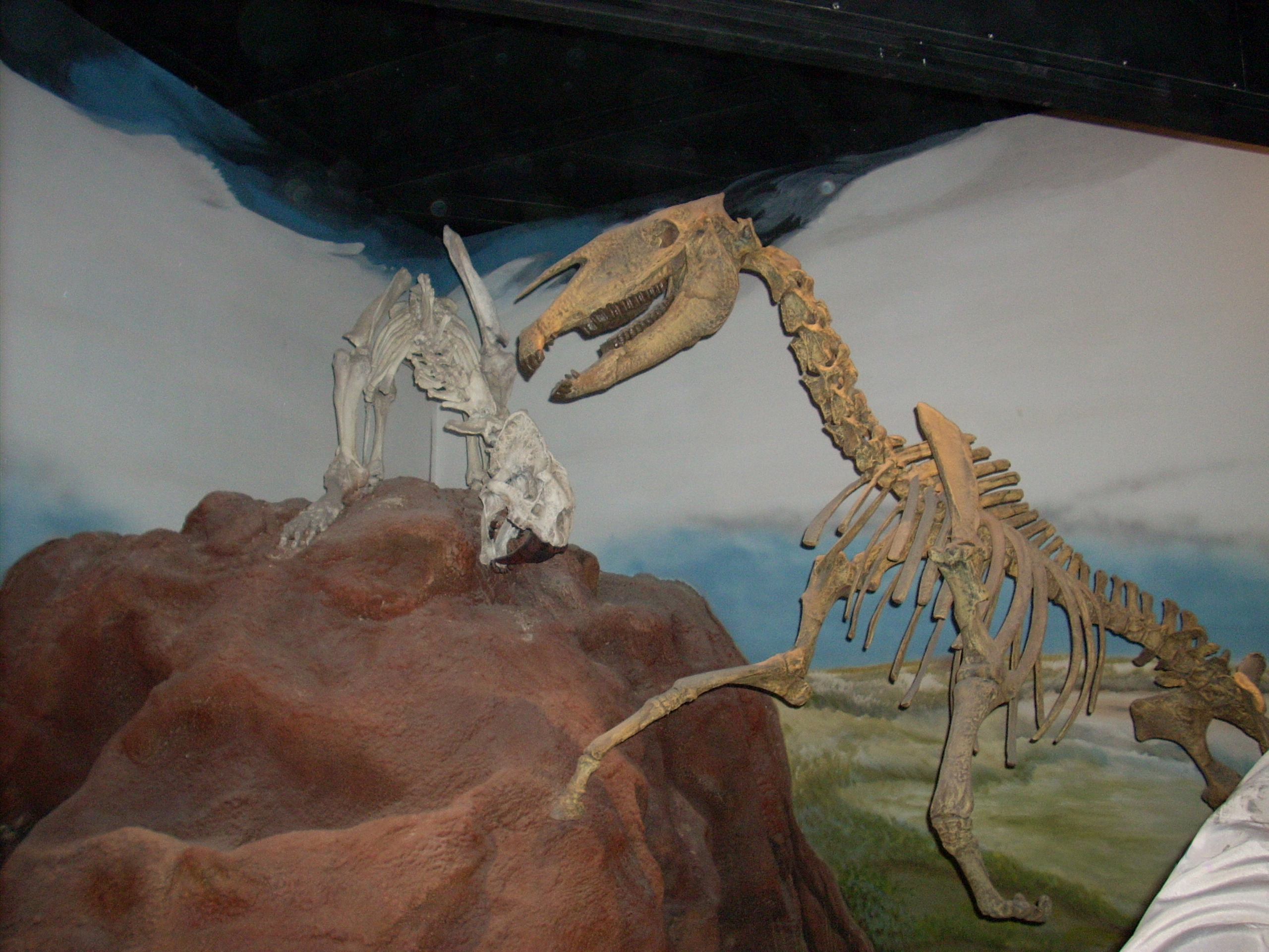 Museo Paleontológico Egidio Feruglio